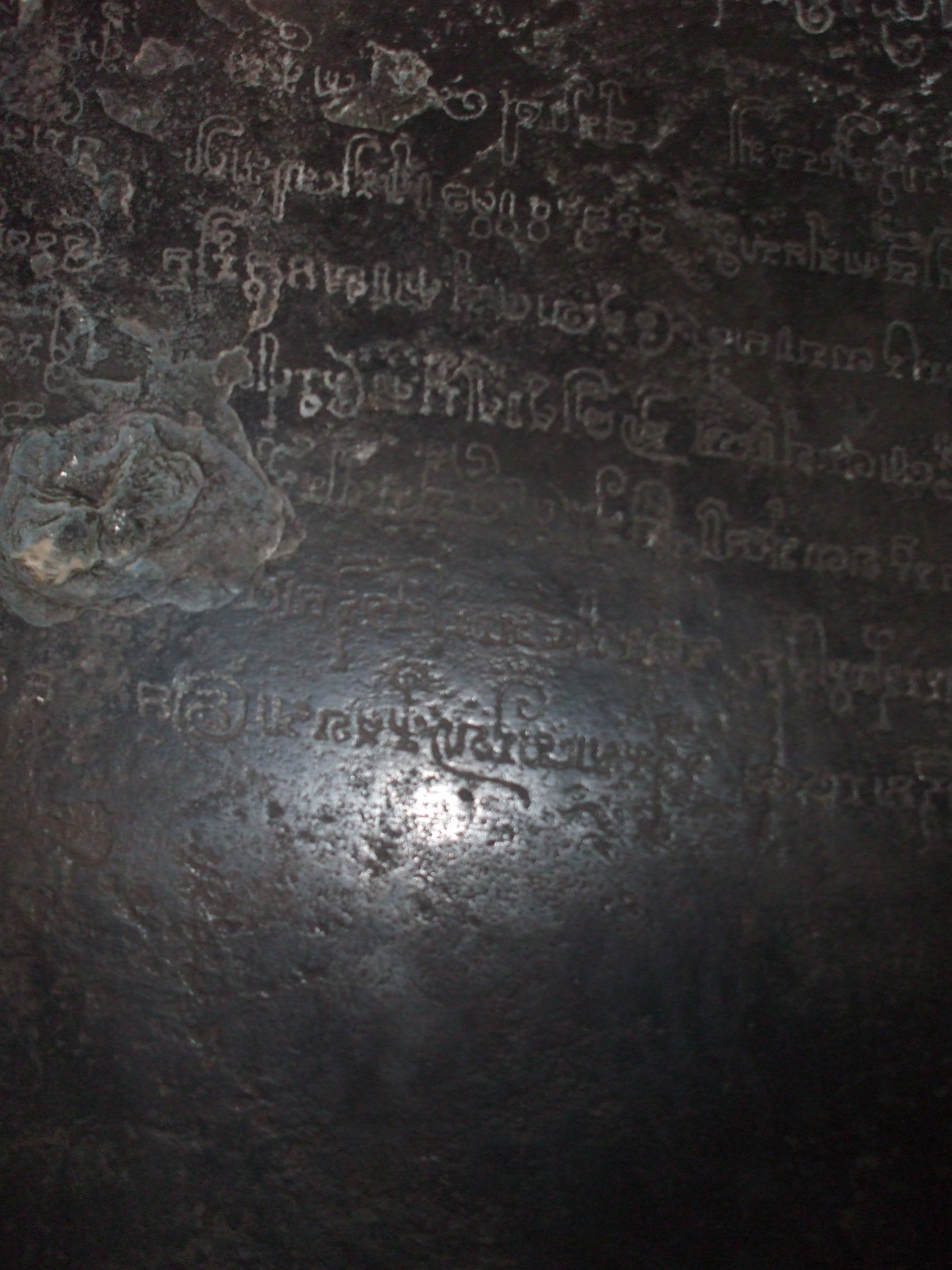 Một trong hai tấm bia đá cổ tại chùa Linh Sơn Ba Thê, huyện Thoại Sơn, An Giang Một trong hai tấm bia đá cổ tại chùa Linh Sơn Ba Thê, huyện Thoại Sơn , An Giang